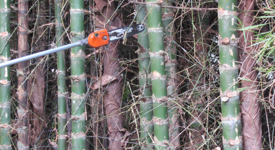 Guadua Acreano em Porto Acre